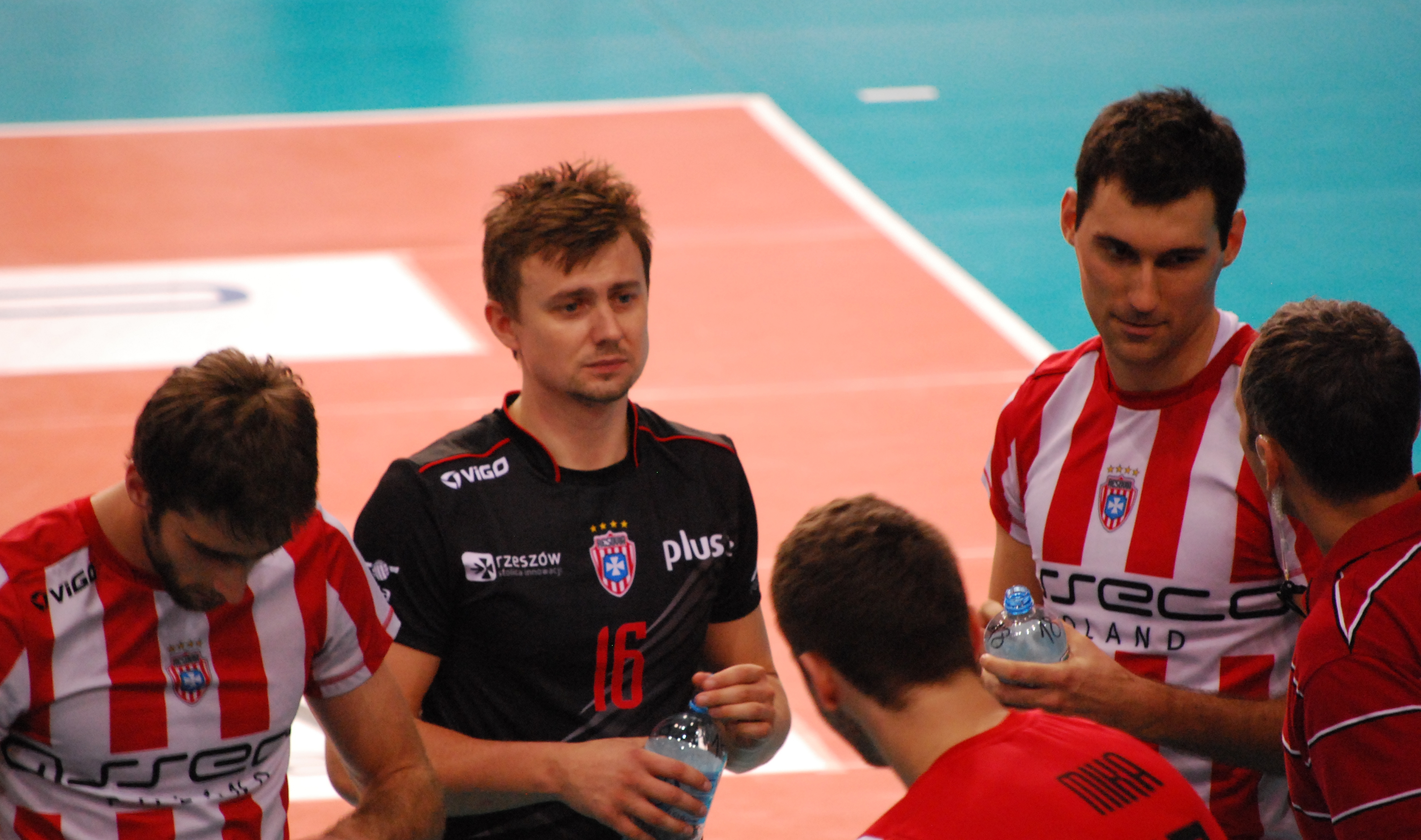 Krzysztof Ignaczak